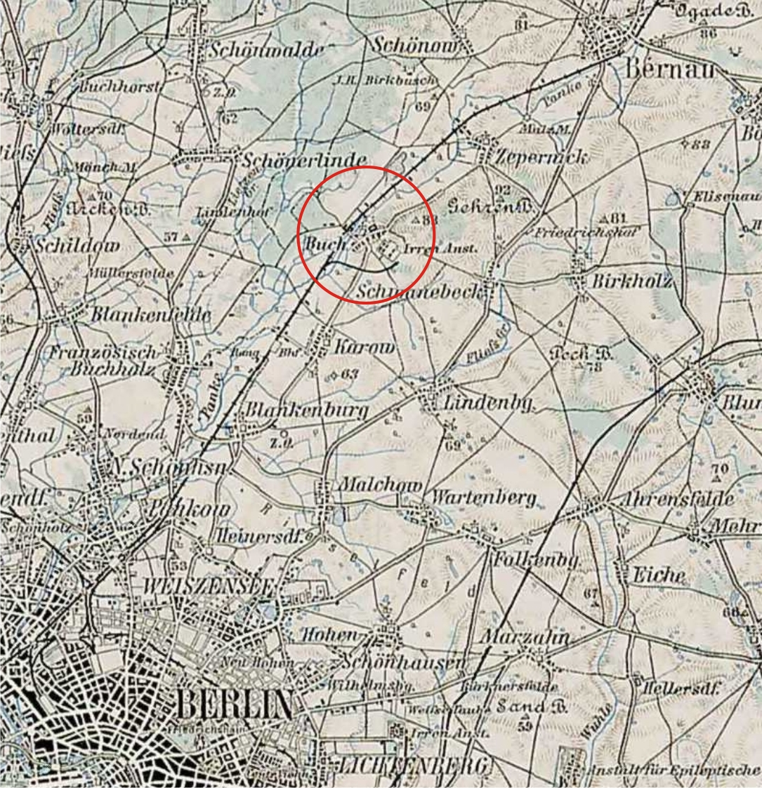 Siedlung Buch um 1900